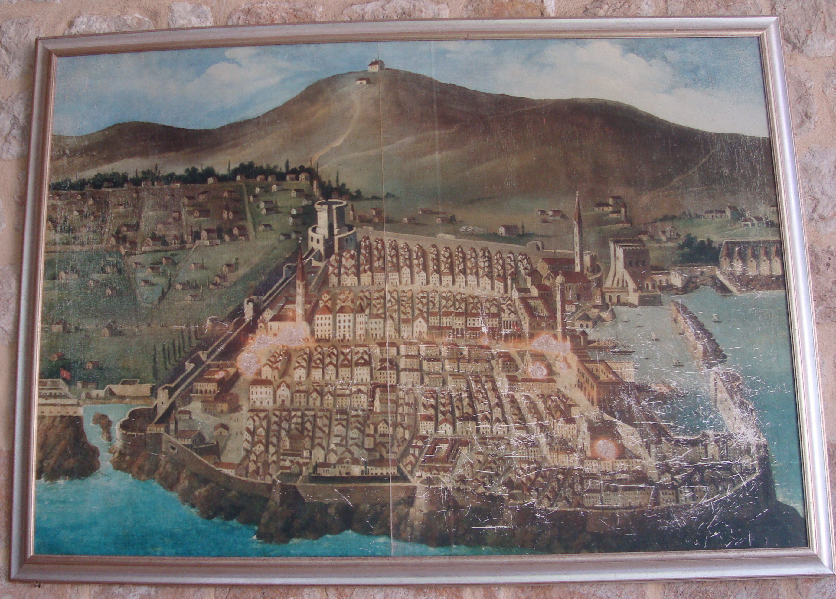 Copie d'un tableau accrochée au murs du cloitre roman du monastère franciscain de Dubrovnik en Croatie représentant Dubrovnik avant le tremblement de terre de 1667.